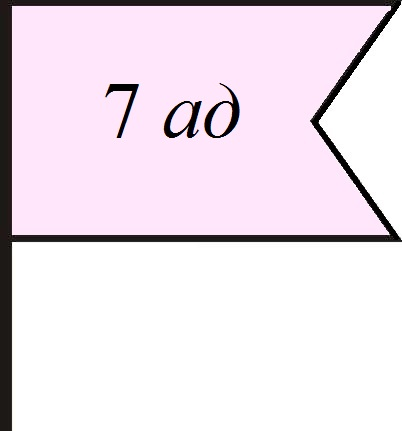 Знак авиационной дивизии на оперативно-тактическую карту